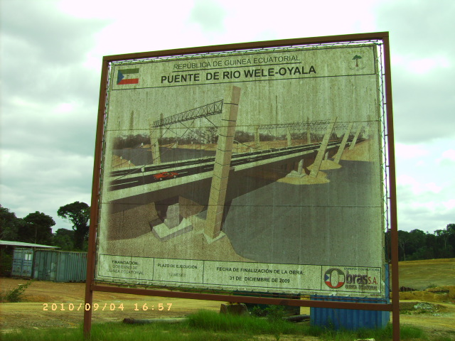 Bauschild einer Brücke in der geplanten Stadt Oyala, Äquatorialguinea